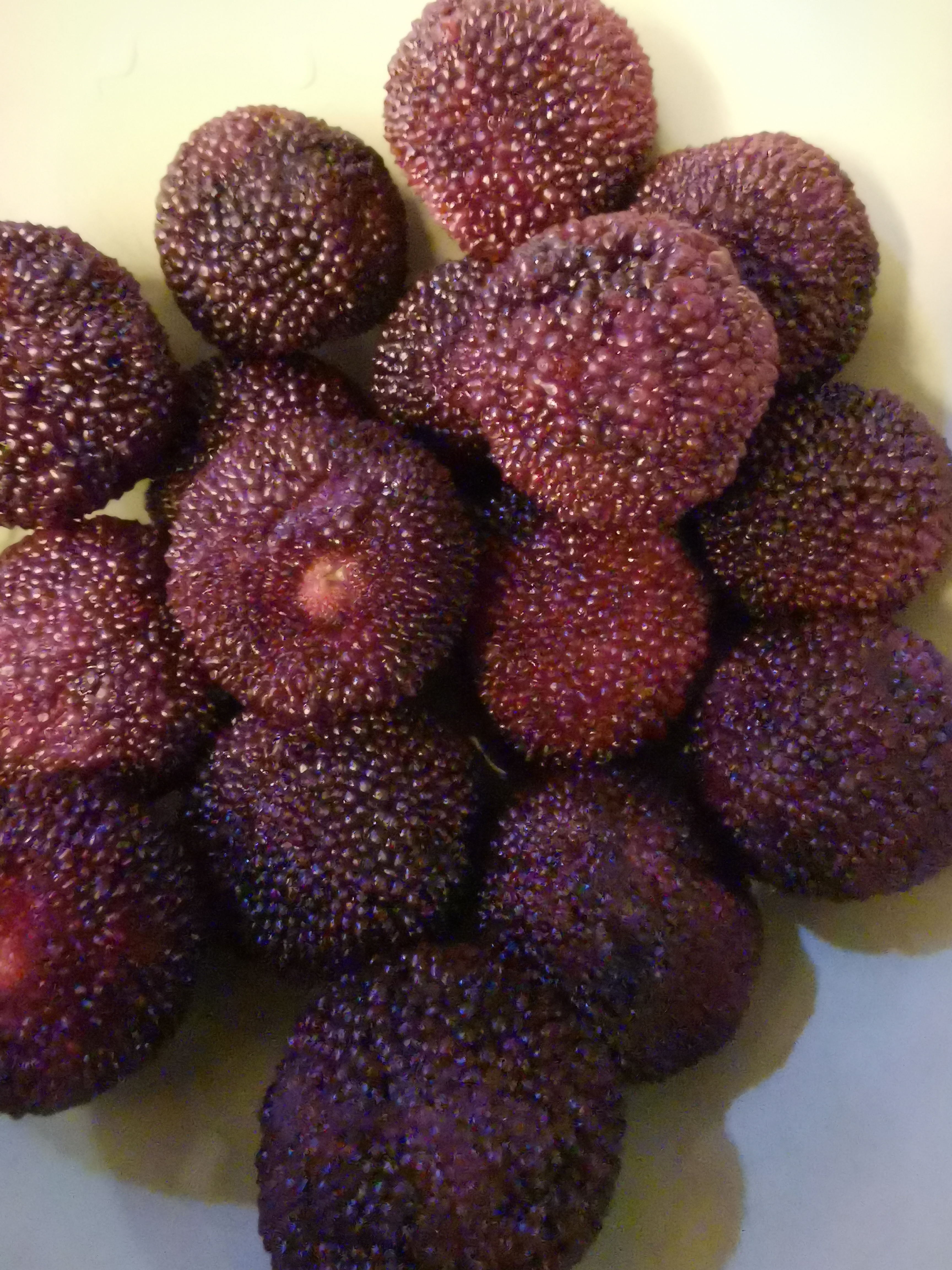 浙江慈溪杨梅